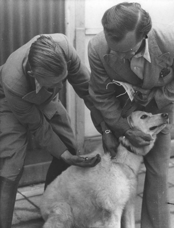 Berlin, Staupeimpfung für Hunde Hundeausstellung am Funkturm U.B.z.: Ungarischer Hirtenhund wird gegen Staupe geimpft. (Dog being vaccinated against canine distemper / Vaccination d'un chien contre la maladie de Carré) Aufn.: Schmidt-Illus 23.6.47 [Herausgabedatum] 629-47